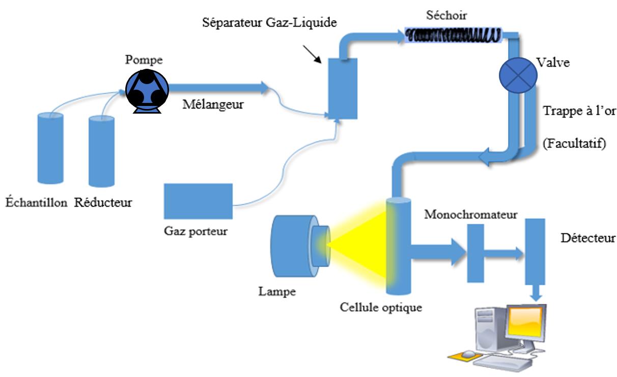 Schéma d'un montage pour la spectroscopie de fluorescence par vapeur froide (CVAFS) avec une trappe à l'or et une pompe péristaltique.